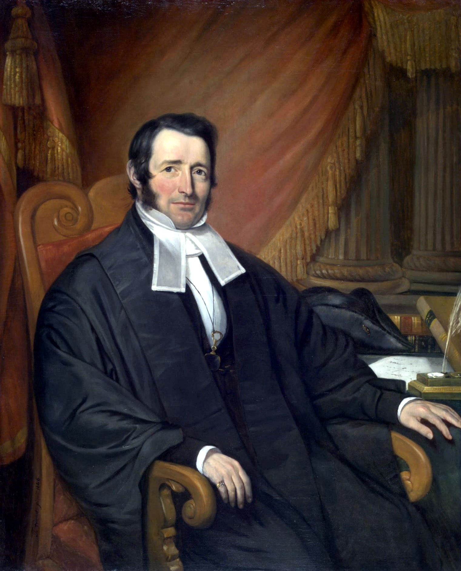 label QS:Lfr,"L'Honorable René-Édouard Caron"